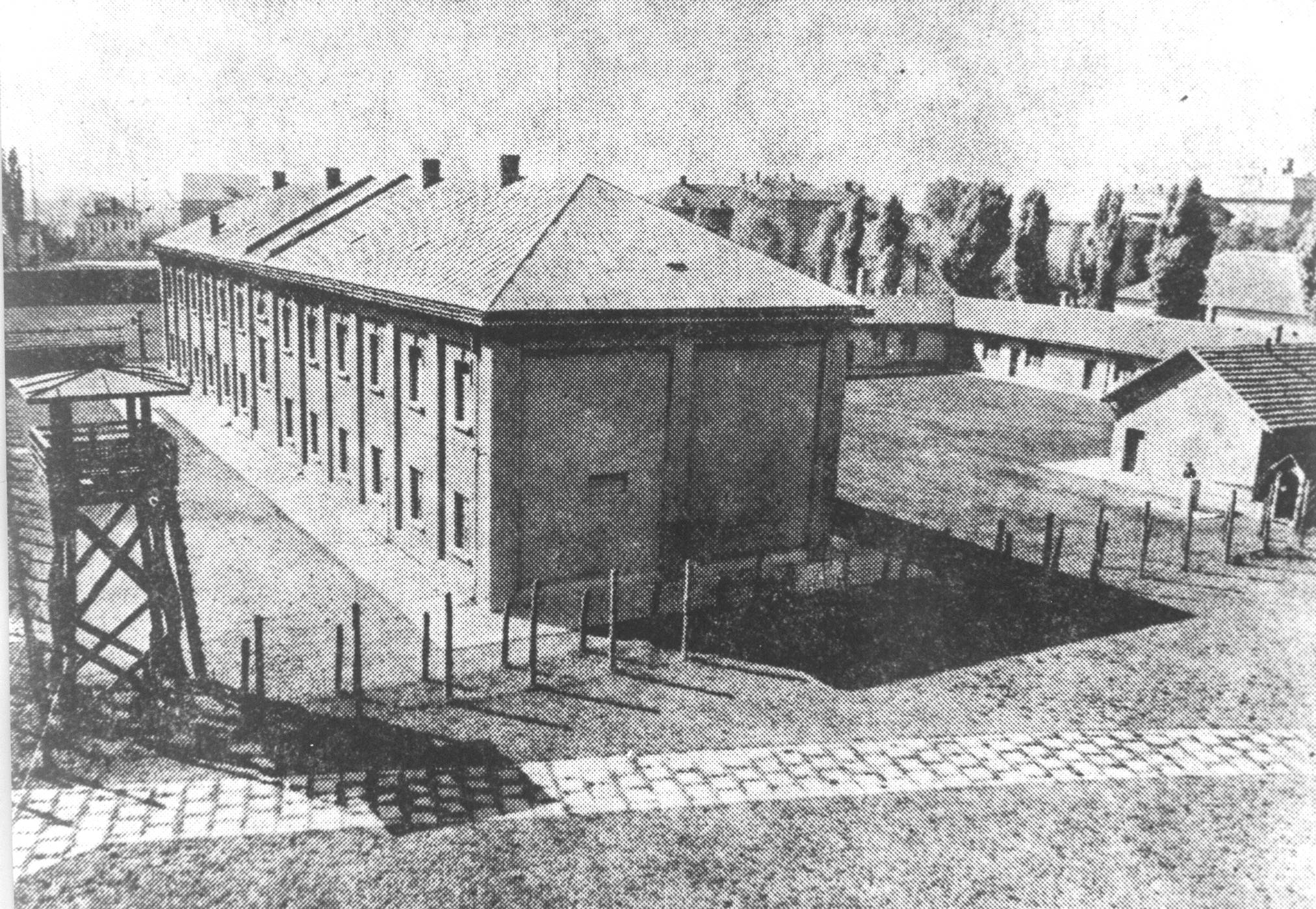 Srpskohrvatski / српскохрватски: Kompleks koncentracionog logora na Crvenom krstu u Nišu.